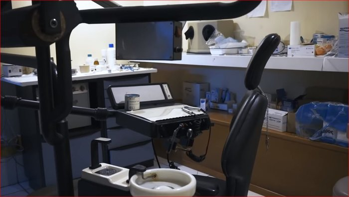 ΟΔΟΝΤΙΑΤΡΕΙΟ ΧΩΡΟΥ ΑΔΥΕ